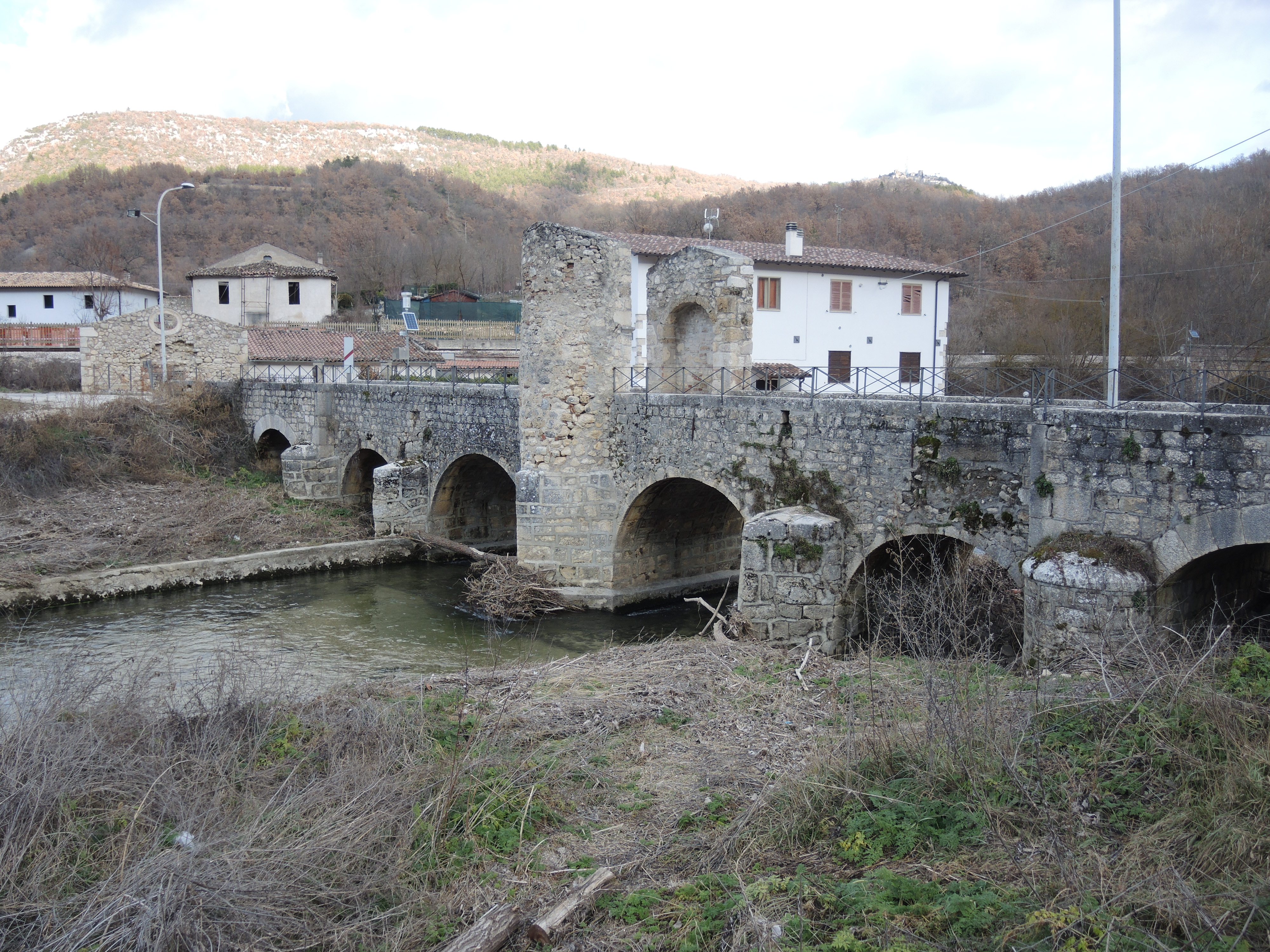 Fagnano Alto: frazione Campana